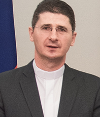 中文（台灣）: 陳建仁副總統今（3）日下午接見教廷梵蒂岡圖書館暨教廷機密檔案室總負責人布魯格斯（Archbishop Jean-Louis Bruguès）總主教，說明我國與教廷的各項互動與交流，並盼持續深化雙方各項實質交流，加強學術合作，以及文獻檔案保存的經驗分享